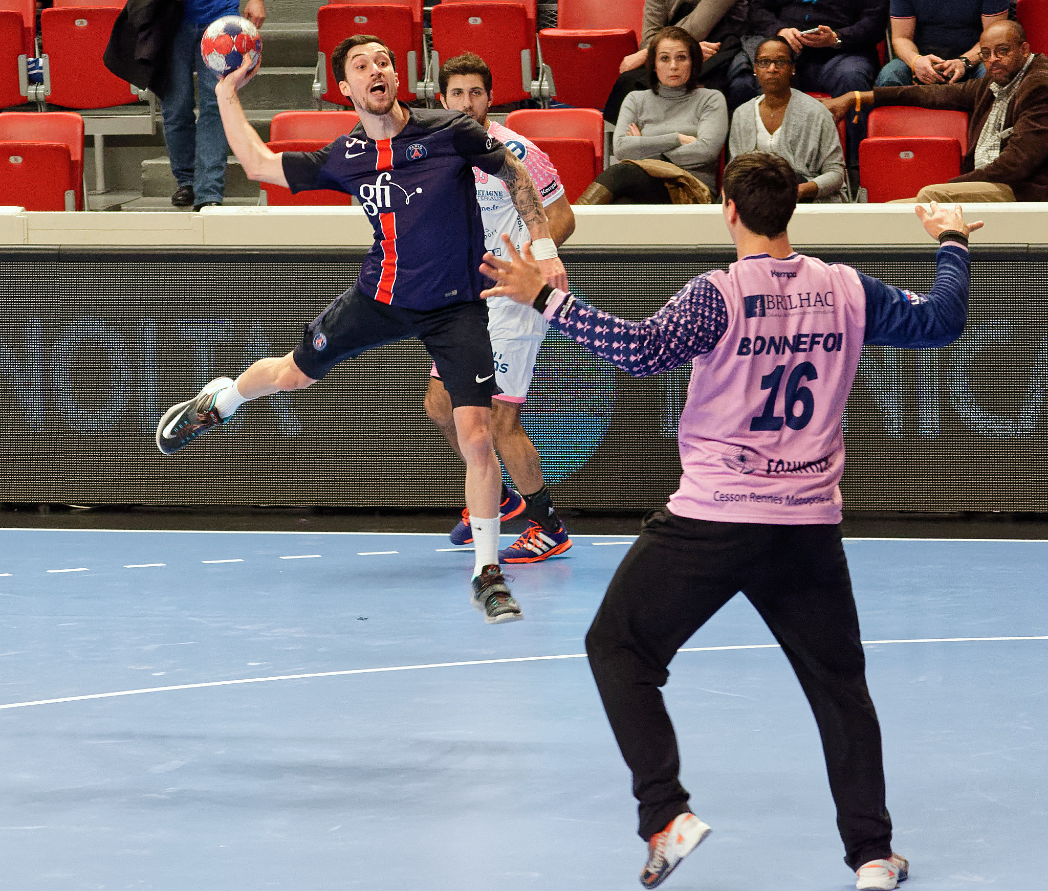 Rencontre du championnat de LNH entre le PSG et Cesson Rennes Métropole. A Coubertin, le 02 décembre 2015.